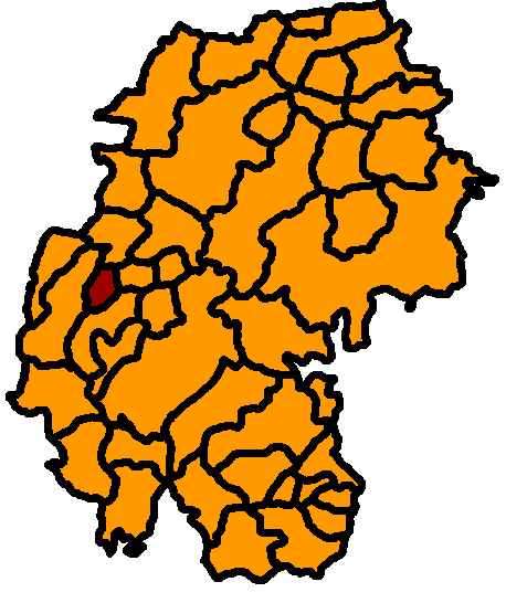 Geschwenda hervorgehoben, Ilm-Kreis